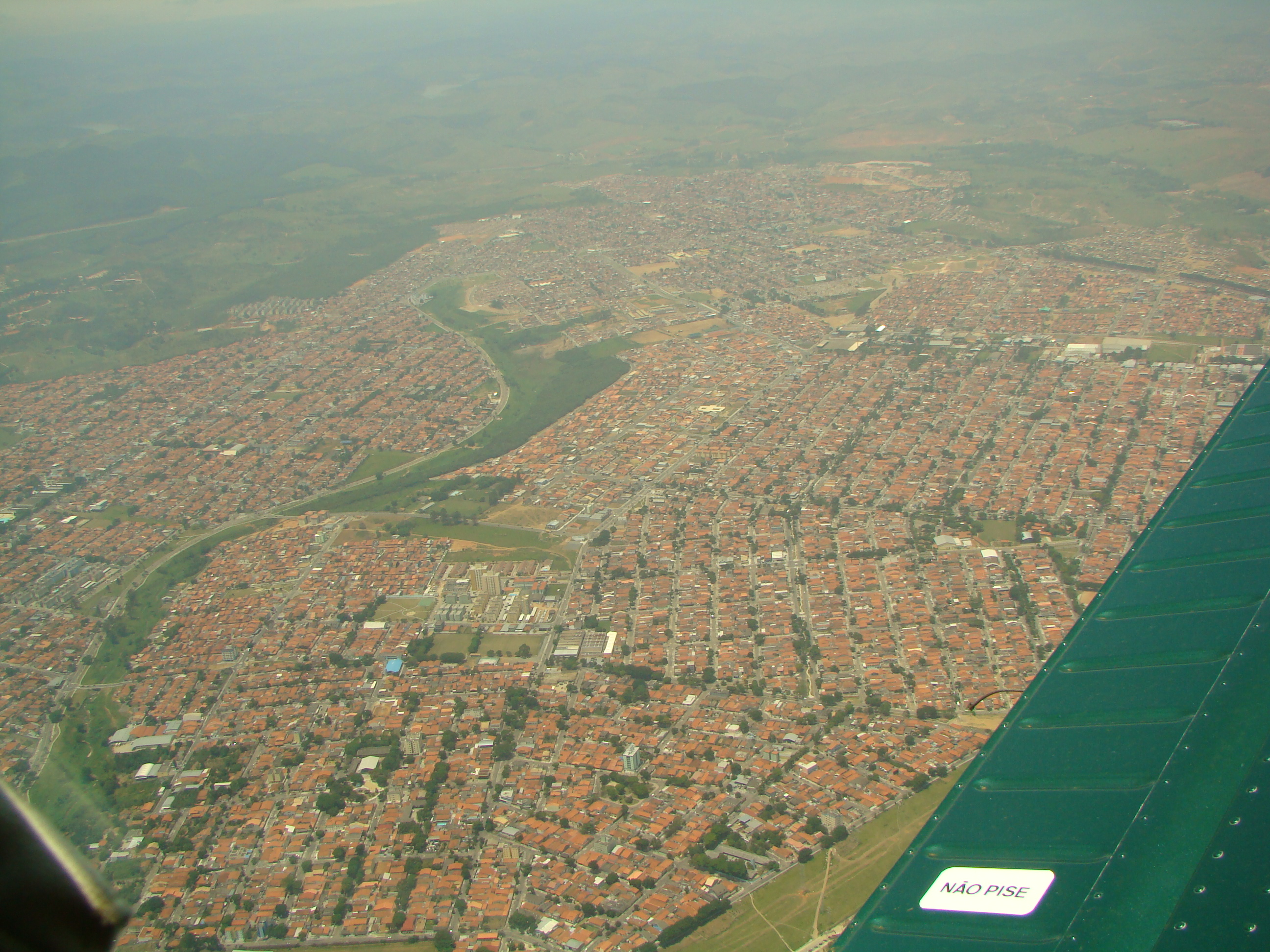 fotografia aérea da zona sul de são jose dos campos